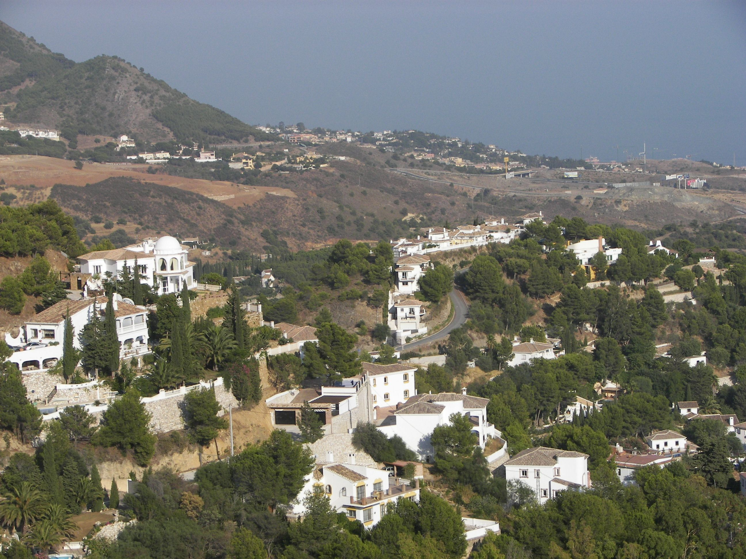 Blick über Mijas nach Benalmadena